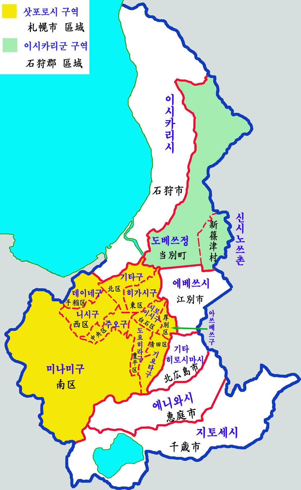 이시카리지청 행정구역